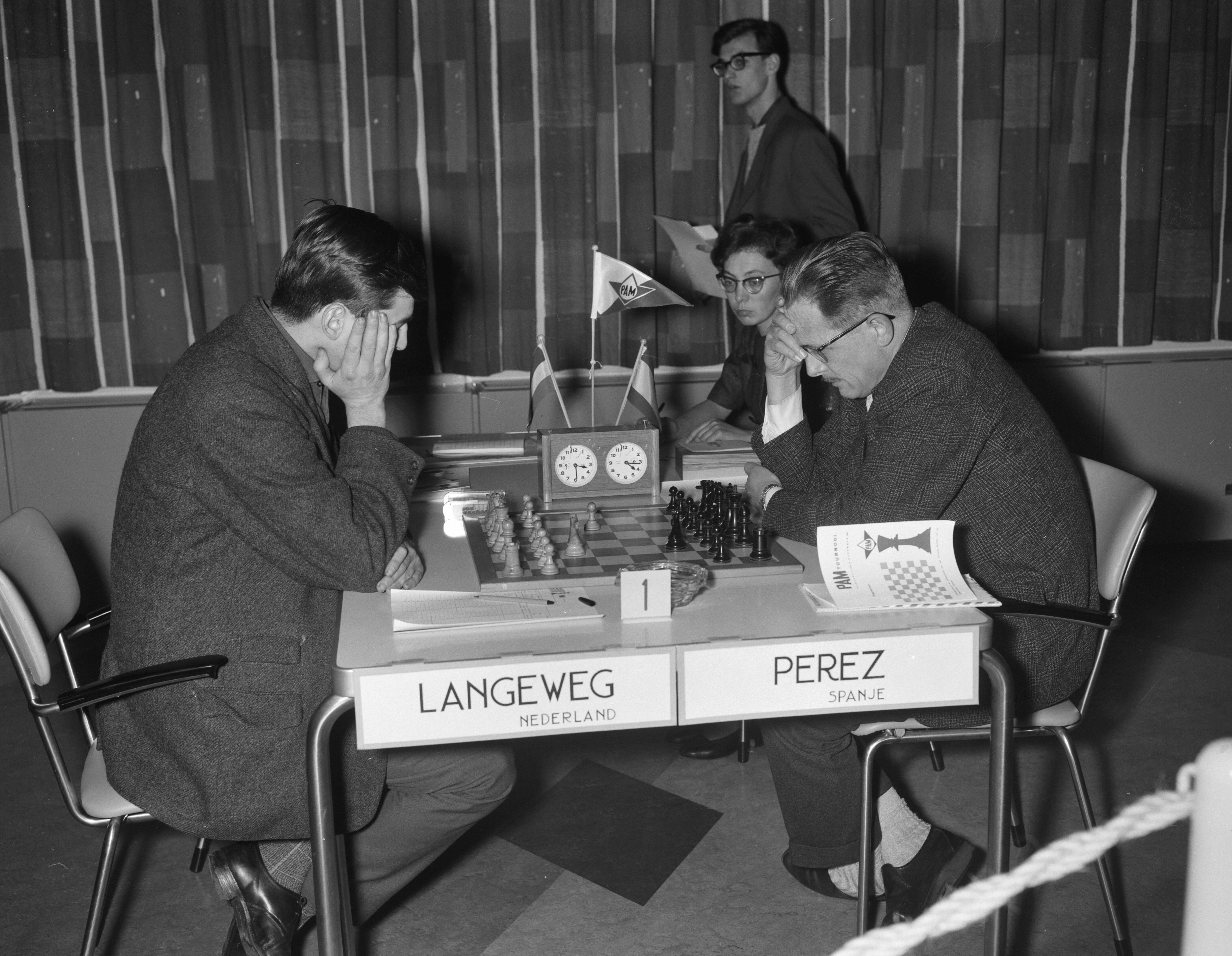 Collectie / Archief : Fotocollectie Anefo Reportage / Serie : [ onbekend ] Beschrijving : Internationaal Schaaktoernooi (PAM-toernooi) in Utrecht. Langeweg (Ned.) tegen Perez (Spanje) Datum : 7 december 1961 Locatie : Utrecht Trefwoorden : Schaaktoernooien Persoonsnaam : PEREZ Fotograaf : Bilsen, Joop van / Anefo Auteursrechthebbende : Nationaal Archief Materiaalsoort : Negatief (zwart/wit) Nummer archiefinventaris : bekijk toegang 2.24.01.04 Bestanddeelnummer : 913-2673